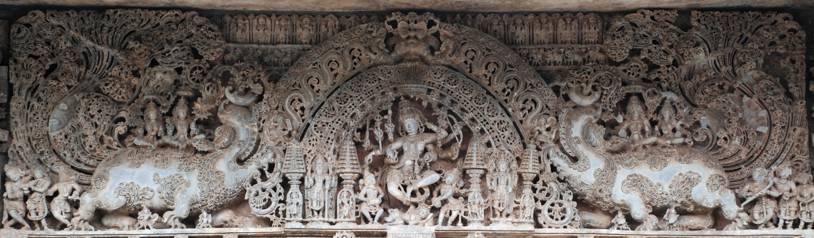 ಕನ್ನಡ: ಮಕರ ತೋರಣ